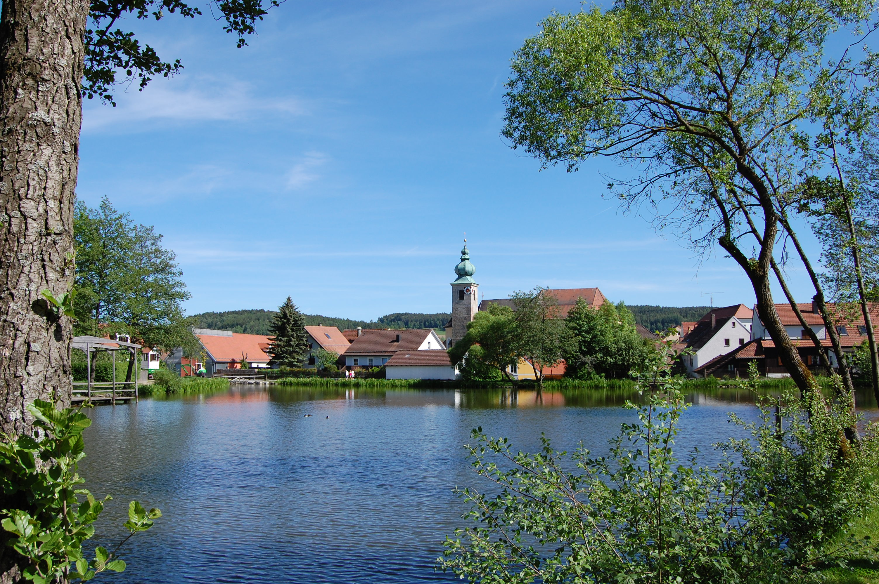 Oberviechtach, Marktweiher mit Pfarrkirche